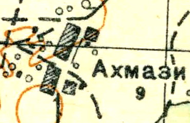 Топографическая карта Ленинградской области, квадрат О-35-24-Б-б (Колхоз Туганицы), деревня Ахмузи